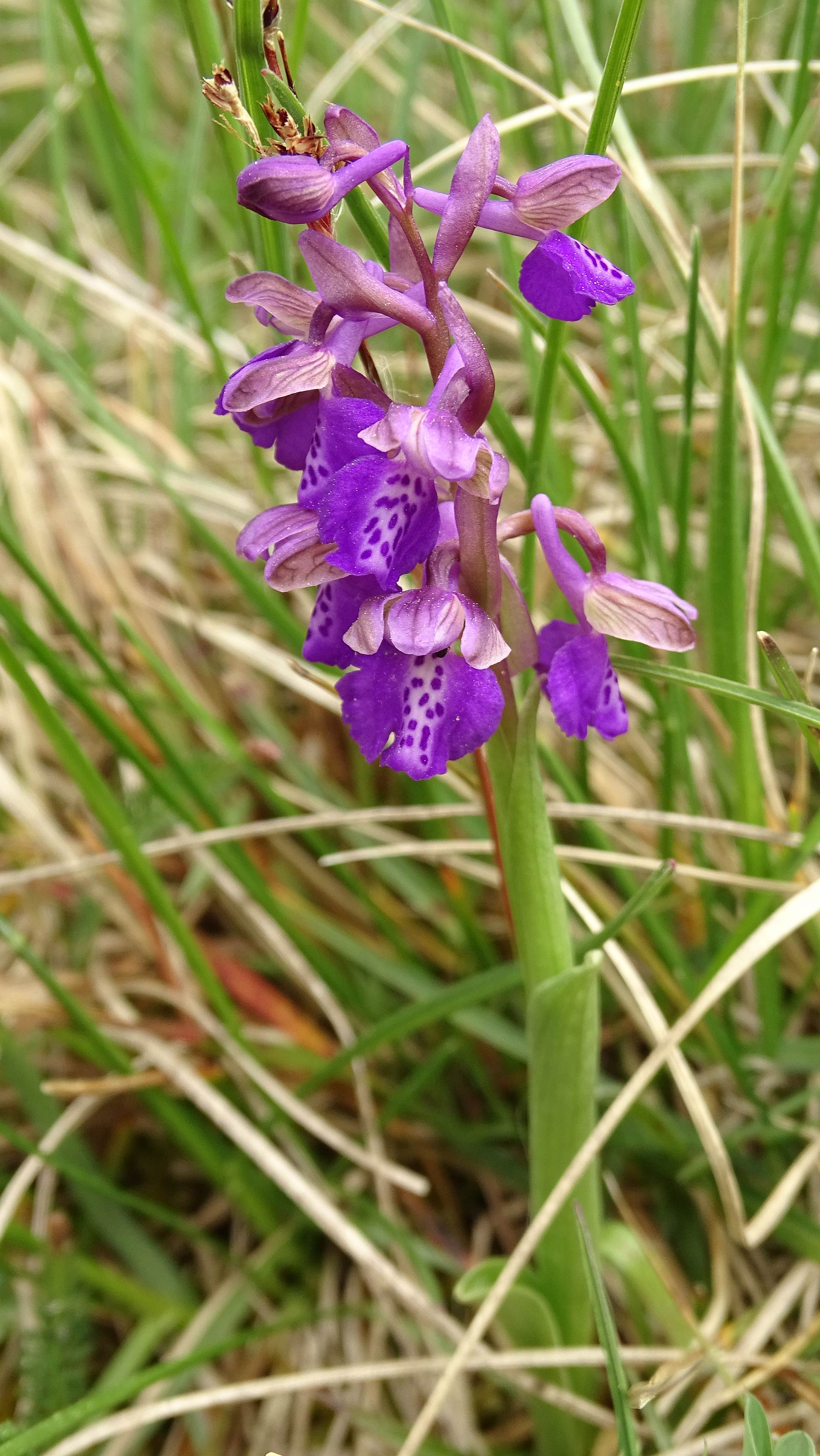 Kleines Knabenkraut (Anacamptis morio), Kaiserstuhl (Gebirge), nord-westlich Wanderparkplatz Schelinger Höhe (Schelingen) und Ohrberg (Naturschutzgebiet), 13.04.2020